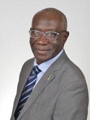 Ritratto Tony Iwobi